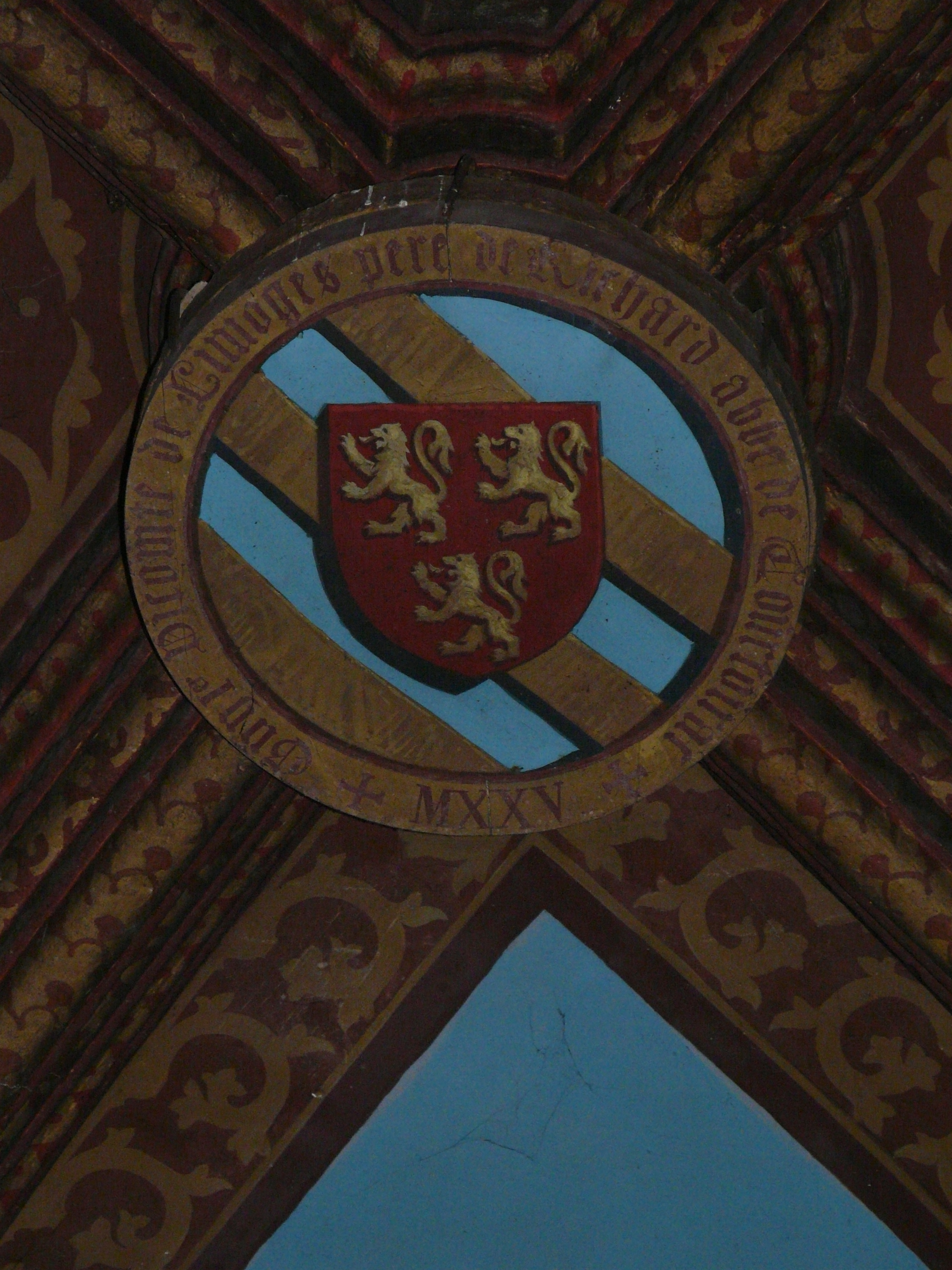 La clé de voûte du chœur de l'église Saint-Martin, Savignac-les-Églises, Dordogne, France. Représentation du blason de Guy Ier, vicomte de Limoges, père de Richard, abbé de Tourtoirac (en 1025)